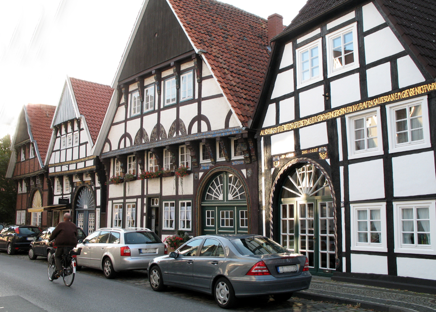 Häuserzeile in der Langen Straße von Wiedenbrück